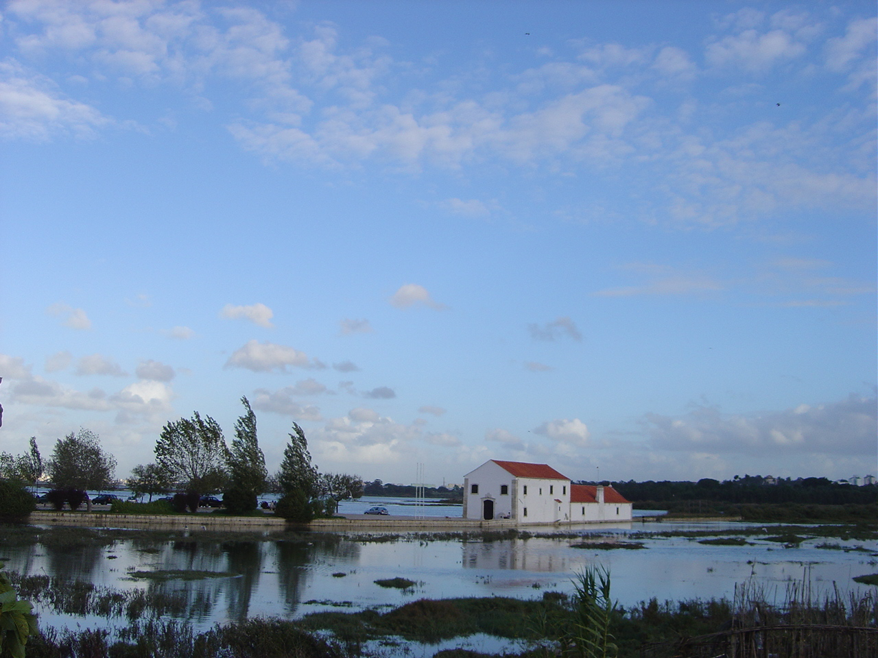 Moinho de Maré, Corroios, Seixal, Portugal.